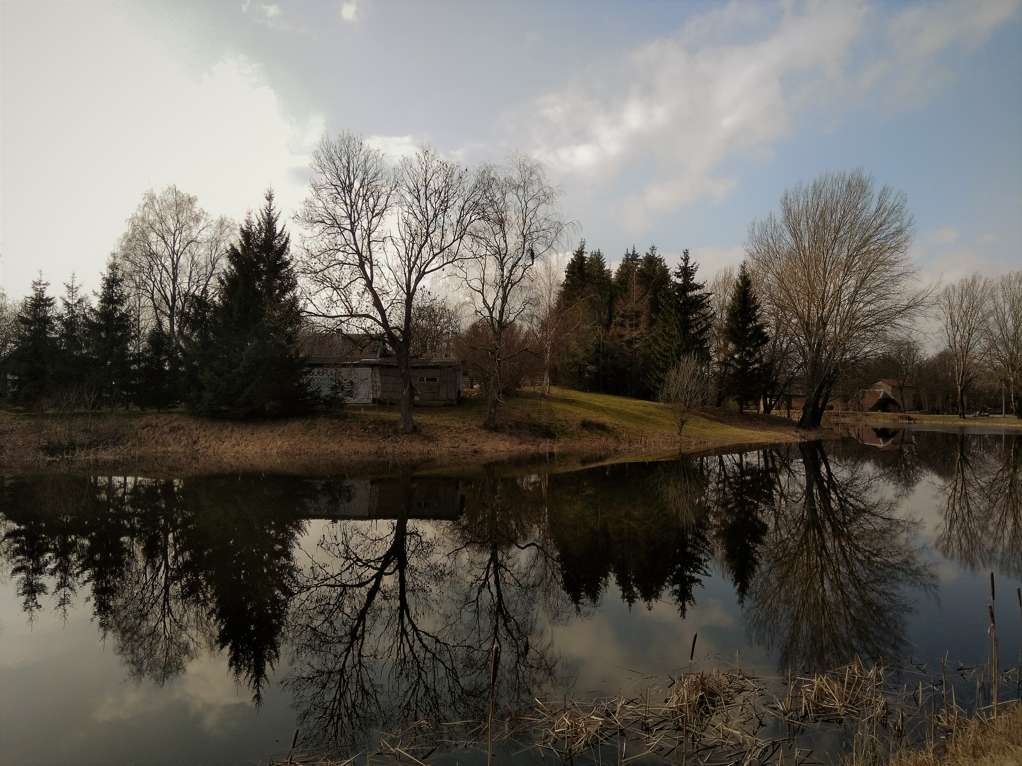 Vaade ida suunast üle Utu-Kolga paisjärve (endine linnuseveskitiik) vasallilinnuse kirdenurgale.